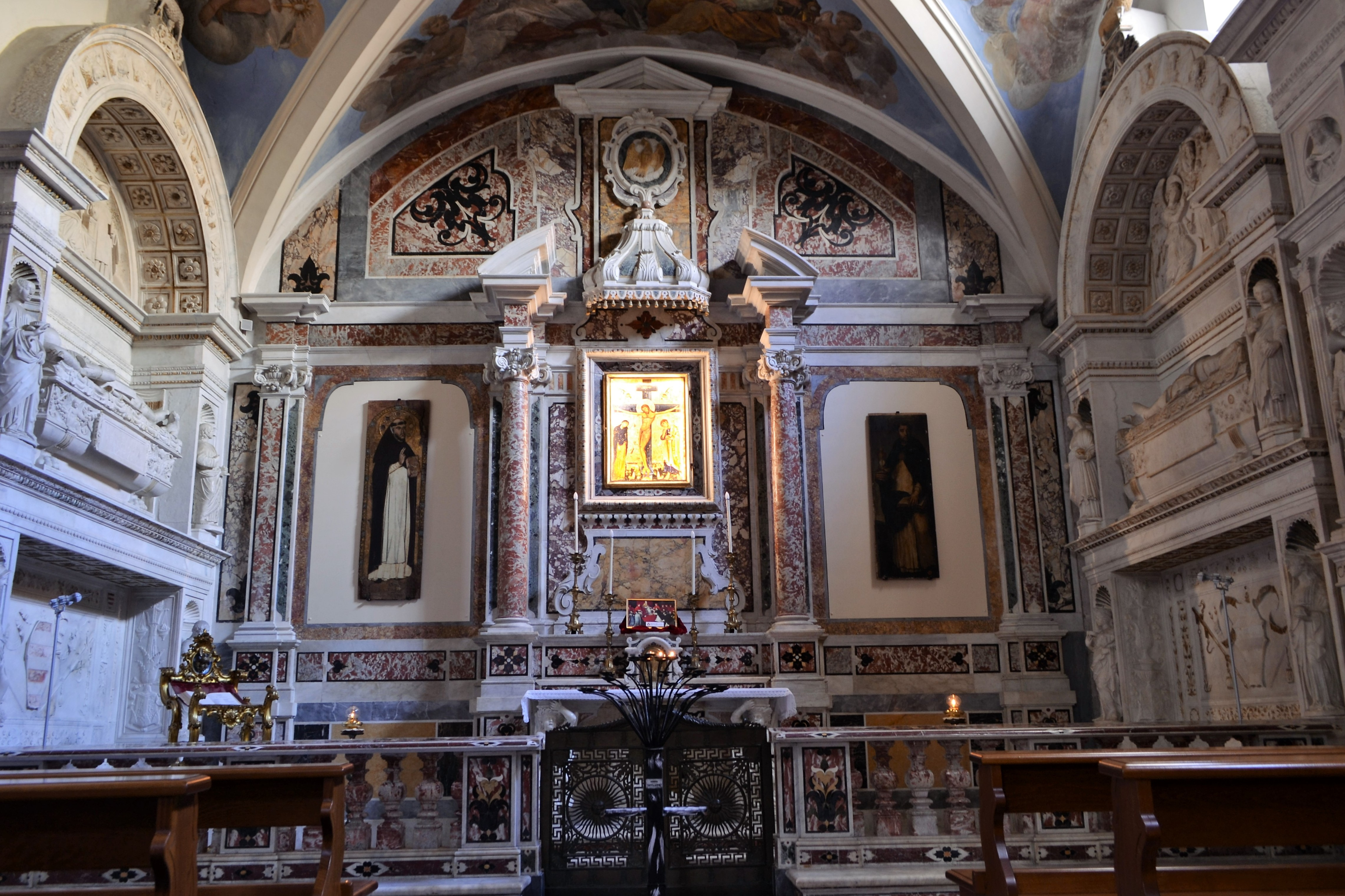 Parete frontale del cappellone del Crocifisso della chiesa di San Domenico Maggiore di Napoli A sinistra il sepolcro di Francesco Carafa, a destra quello di Diomede Carafa. Al centro la riproduzione fotografica del Crocifisso che parò a san Tommaso (originale in convento); alla sua sinistra tavola duecentesca su san Domenico; a destra tavola quattrocentesca su San Domenico.